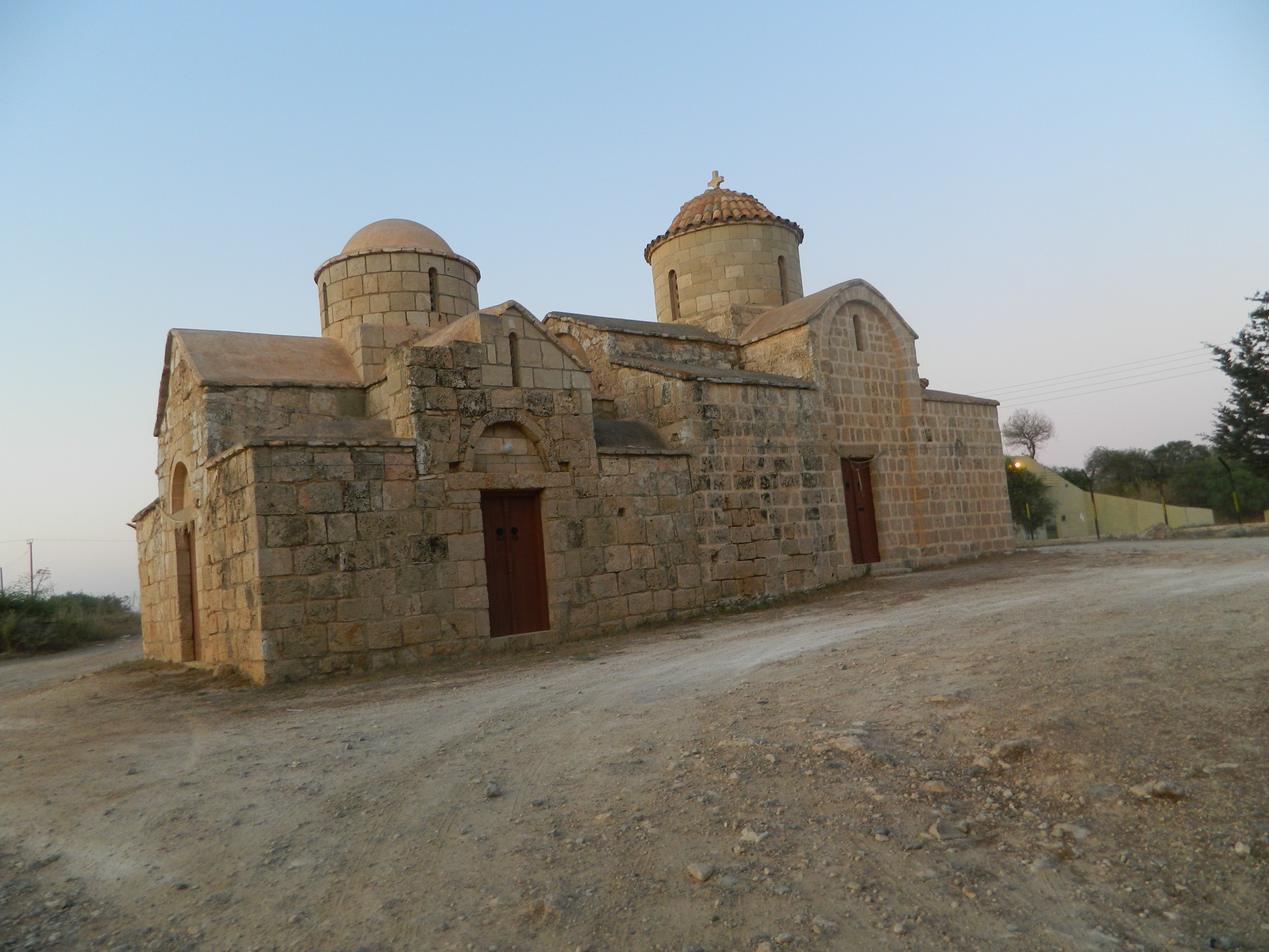 Agios Georgios Chortakion